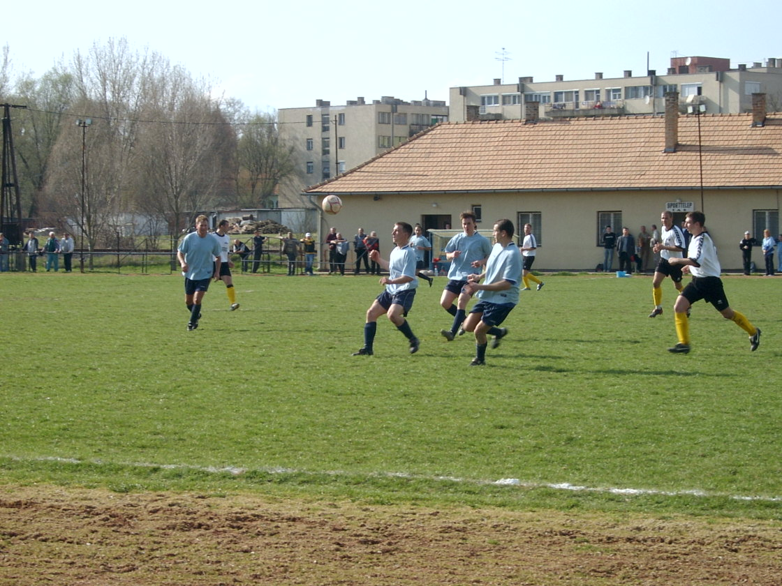 A Tab-Lábodi MEDOSZ (5-1) mérkőzésen készült kép. (saját felvétel)